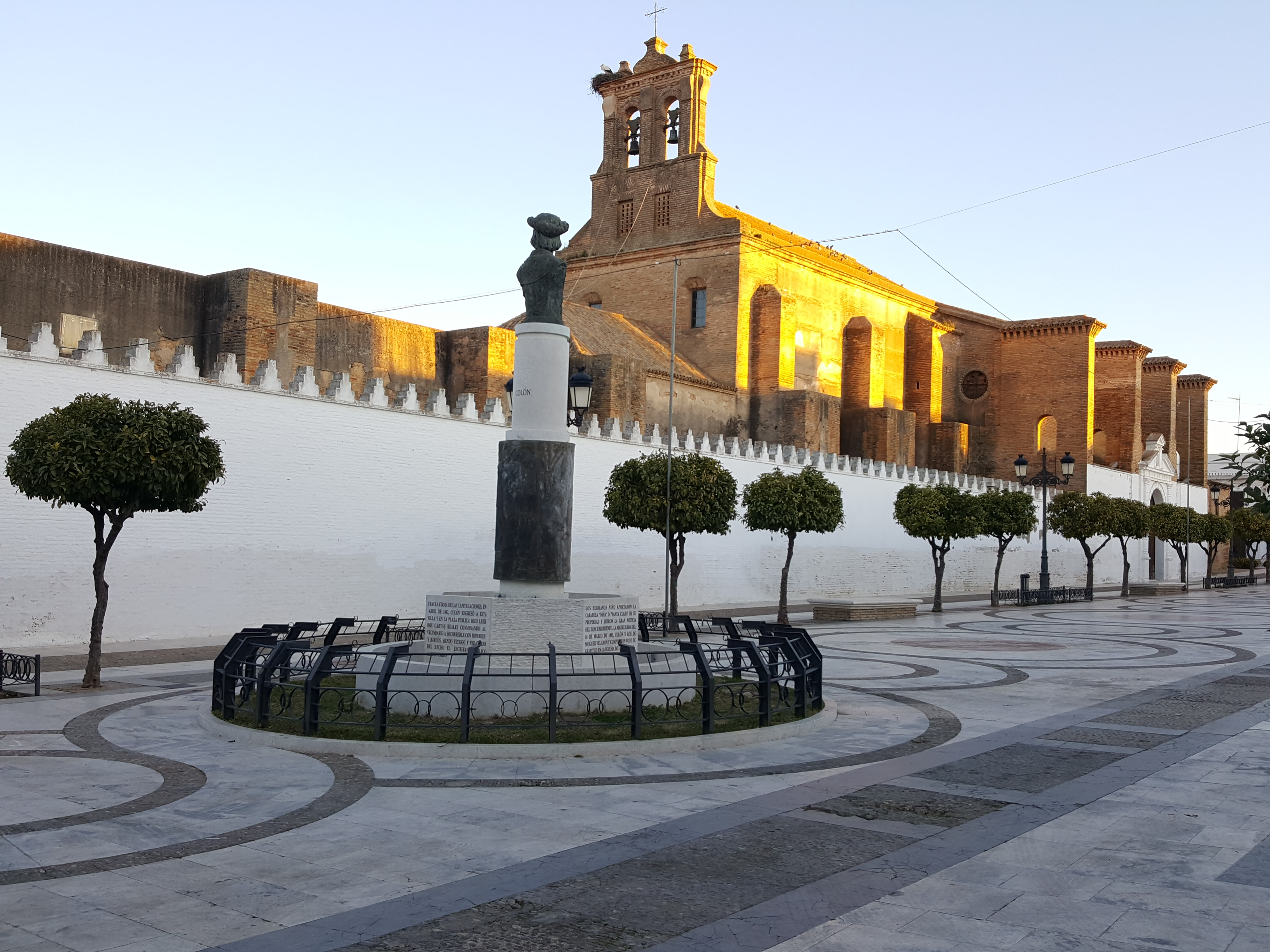 Monumento a Cristóbal Colón en Moguer Andalucía (España). Entorno del monumento.